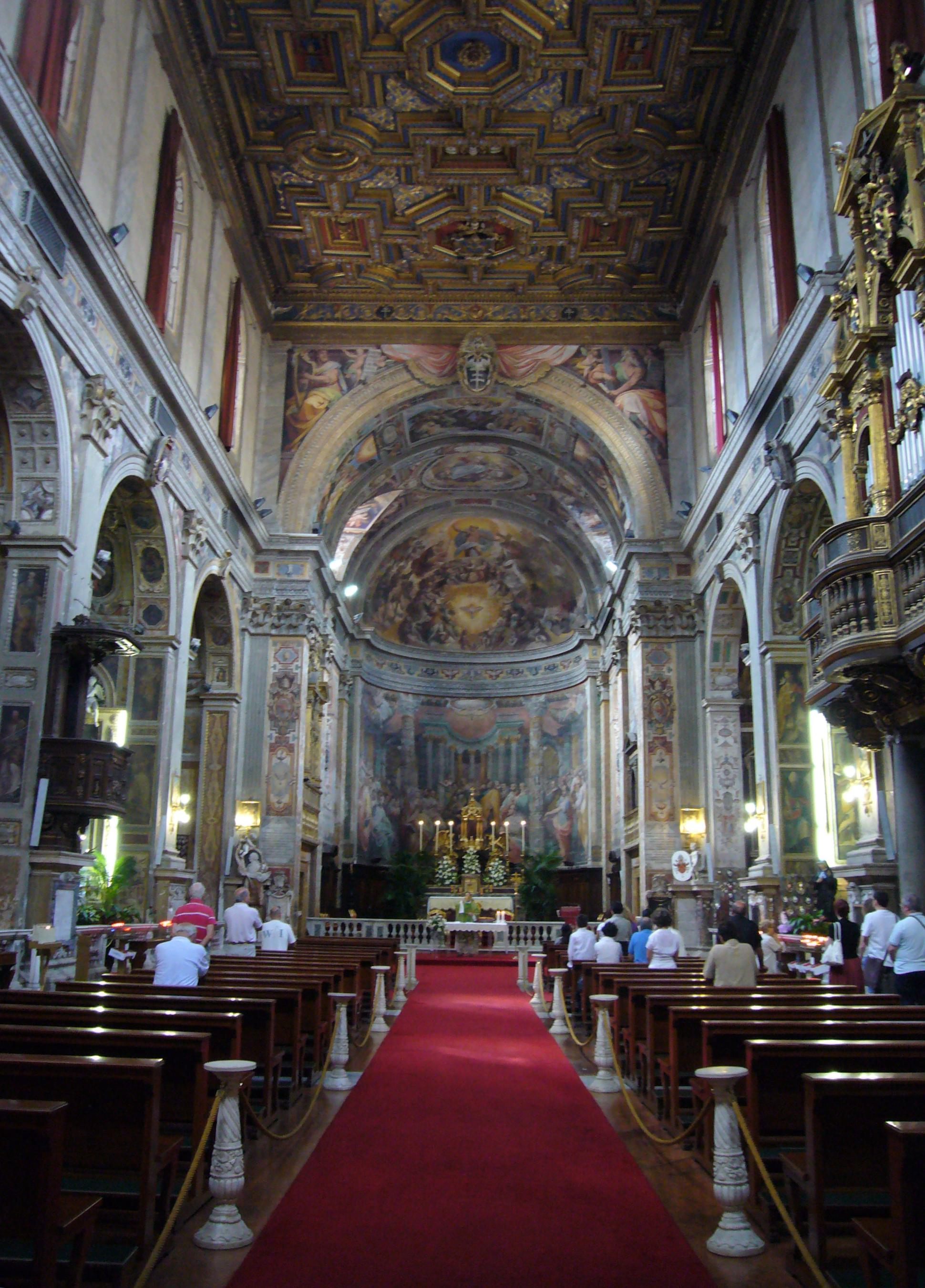 Roma, Santo Spirito in Sassia: interno